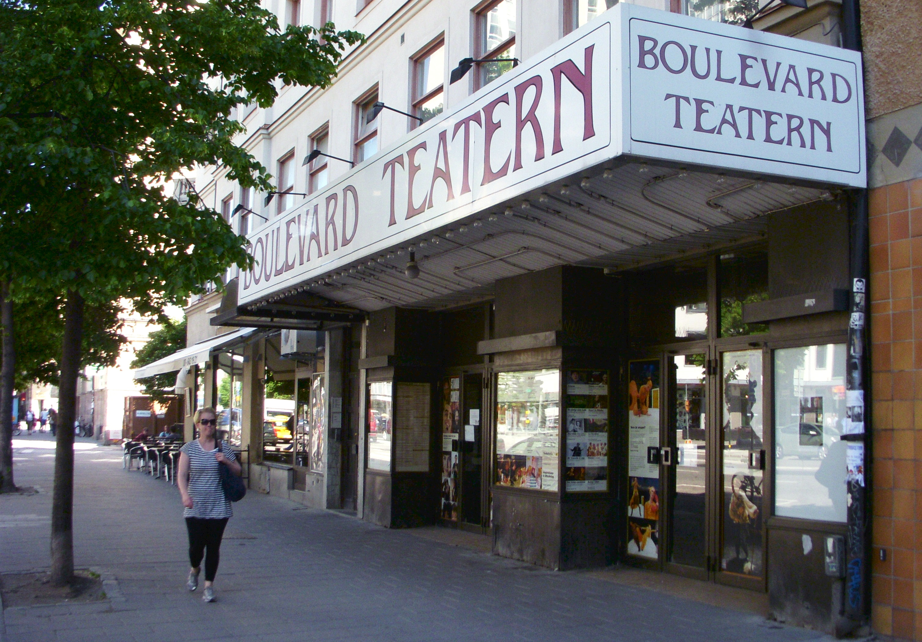 Boulevard Teatern på Södermalm i Stockholm